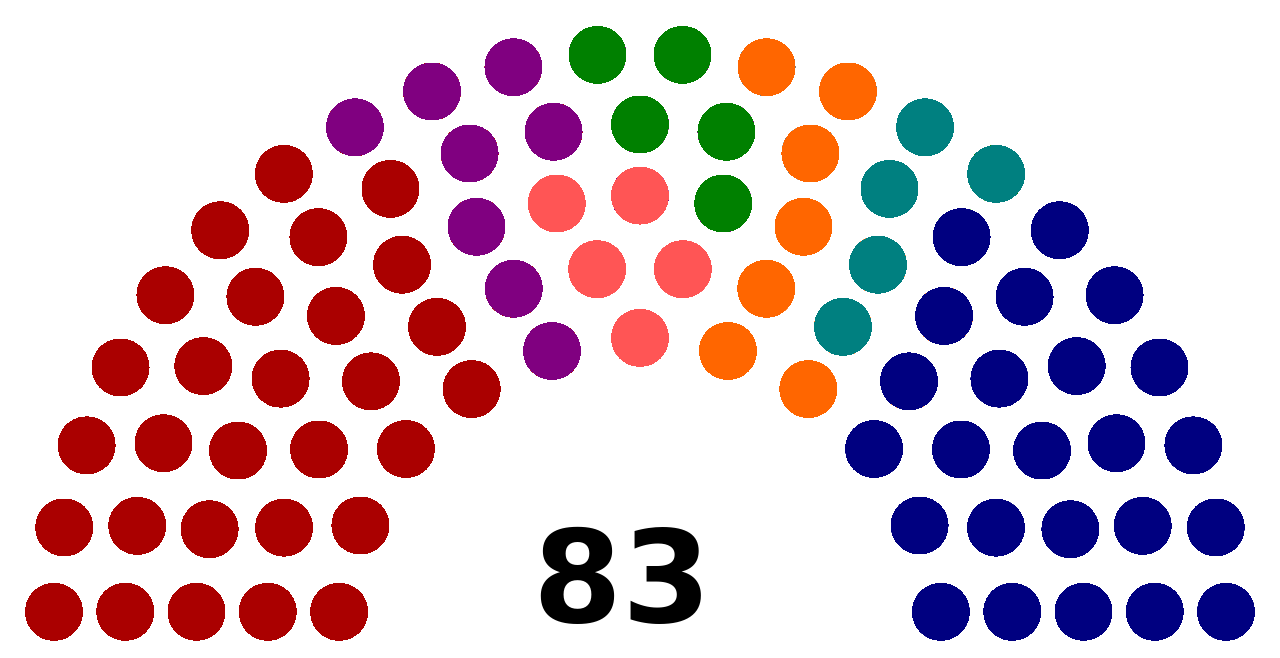 Расподјела мандата у Народној скупштини Републике Српске након избора 2014. СНСД 29 СДС 24 ДНС 8 ПДП 7 Домовина 5 НДП 5 СП 5